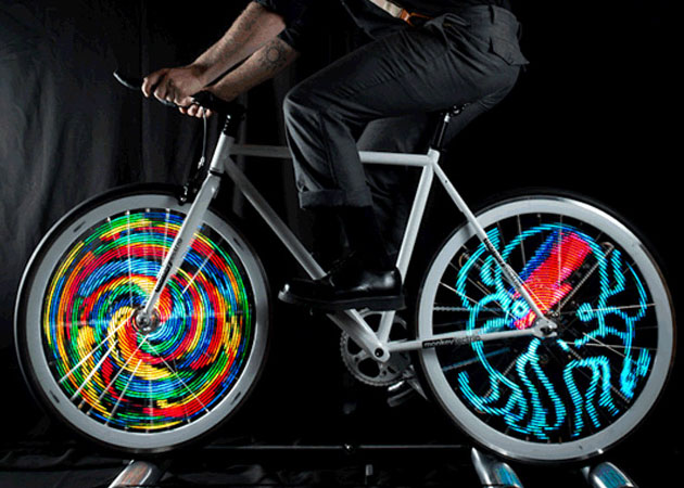 Muestra la función de la Monkey Ligth Pro